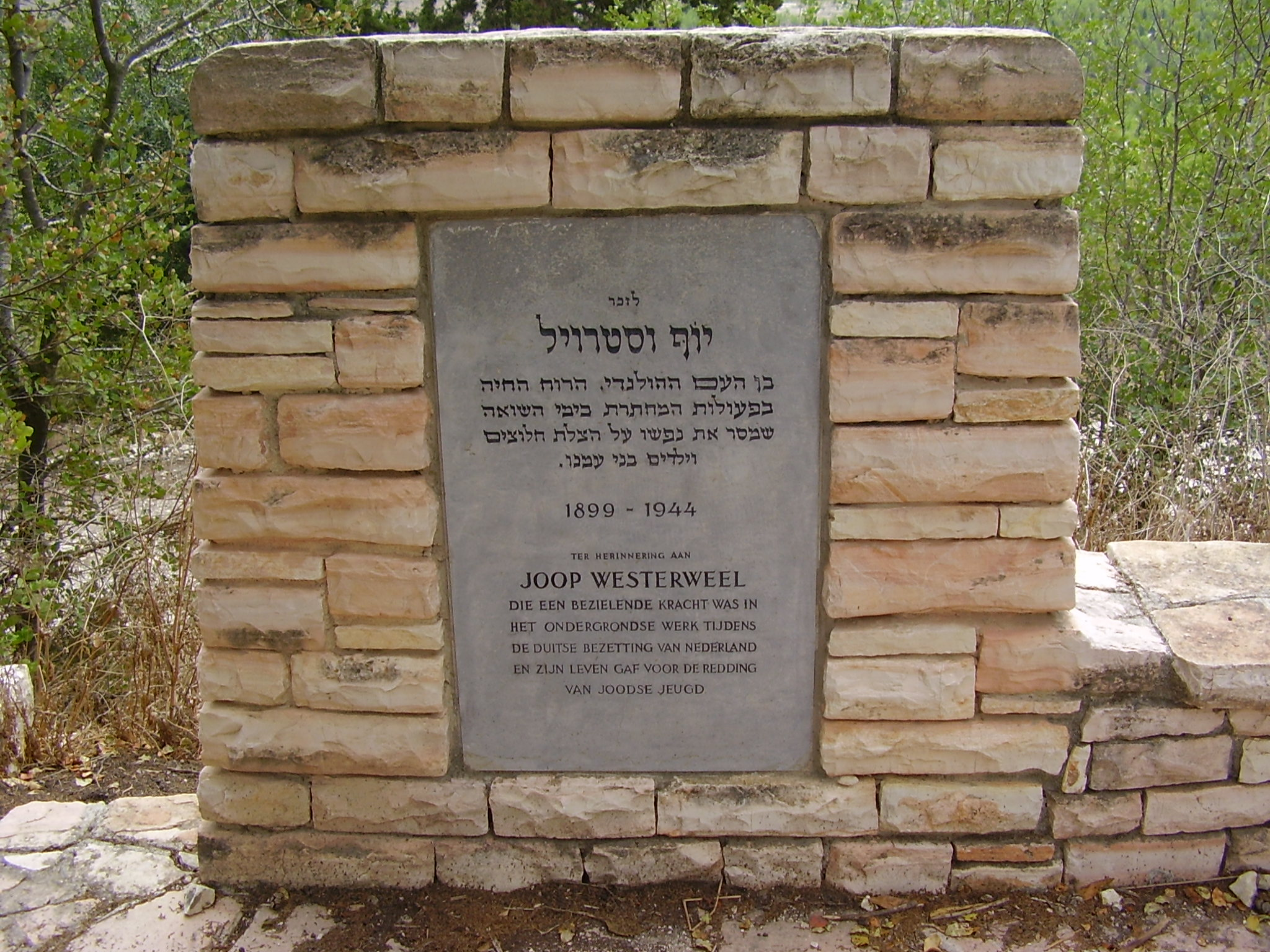 Joop Westerweel Memorial in Israel